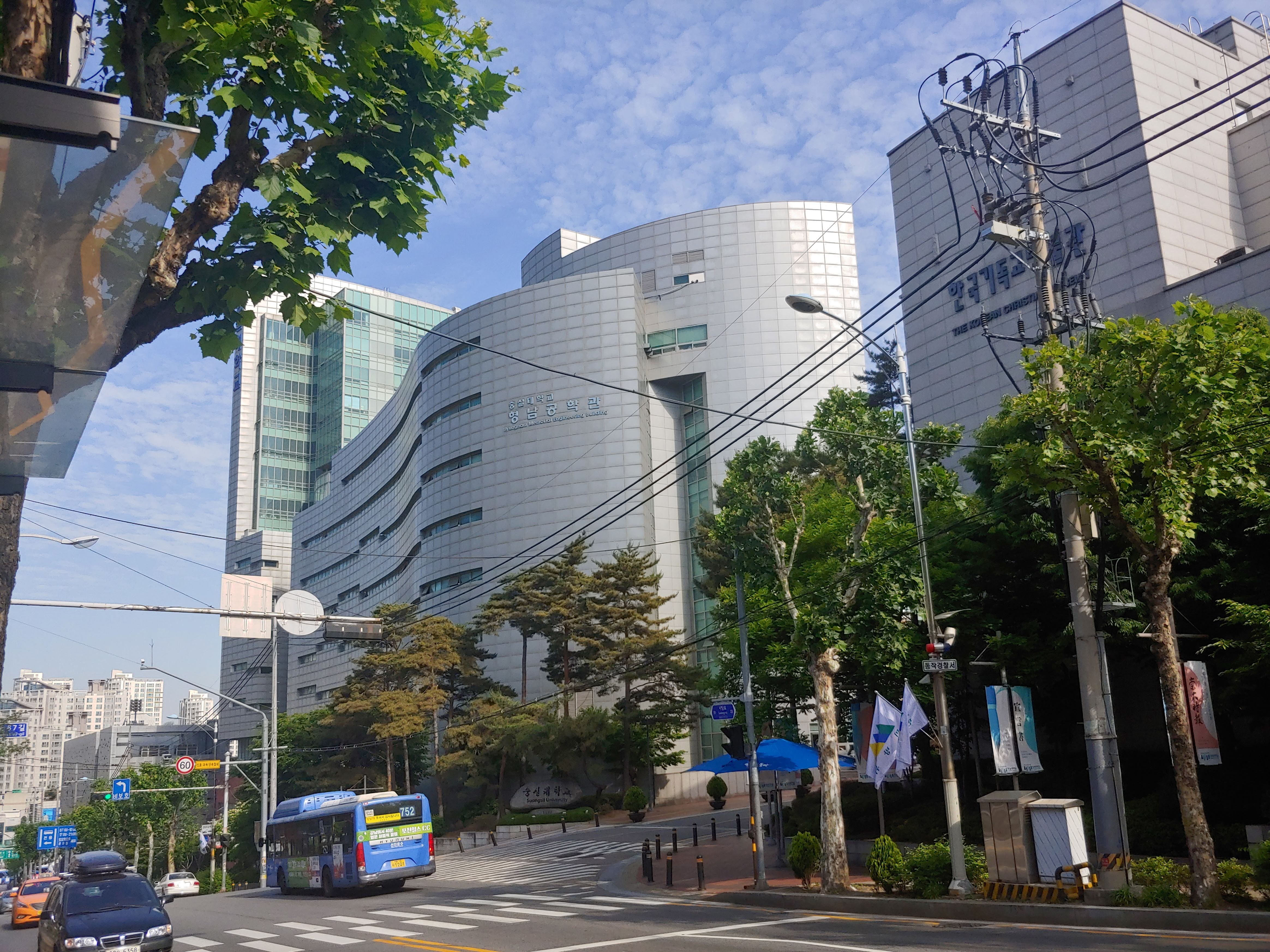 Photo du côté Sud de l'université de Soongsil.